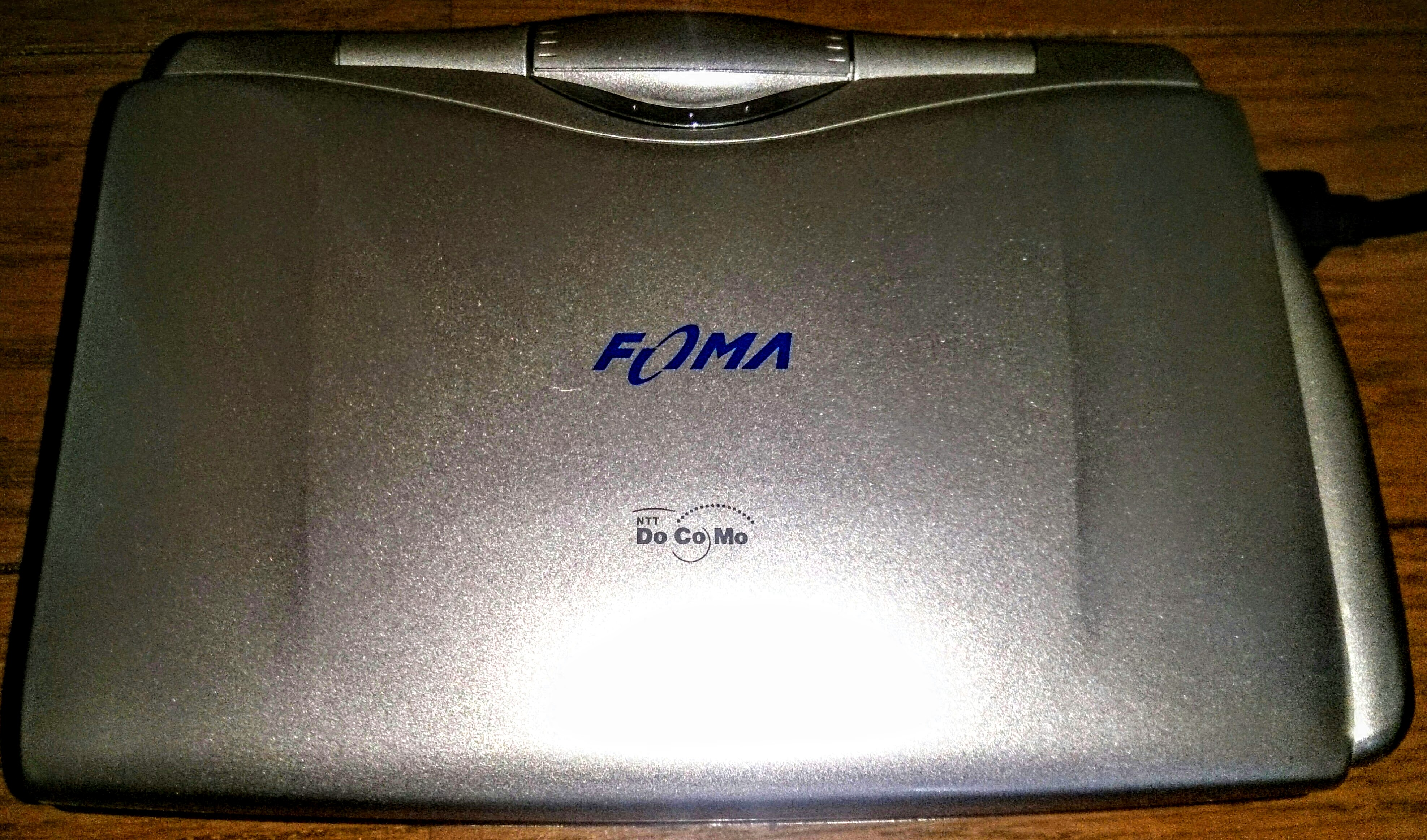 SH2101V・閉じた様子